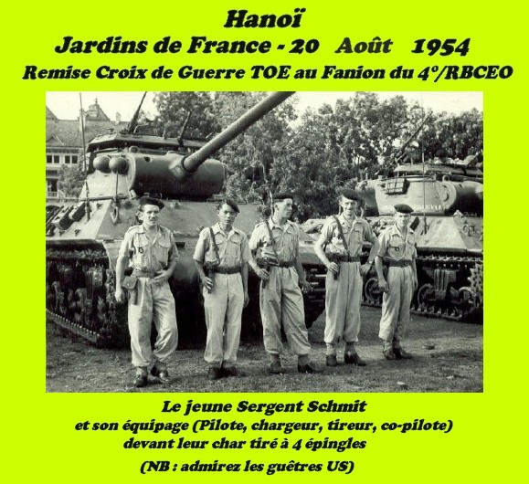 Panzerjäger US TD M 36 B 2 mit Mannschaft